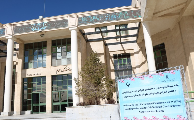 ساختمان دانشکده‌ی علوم پایه